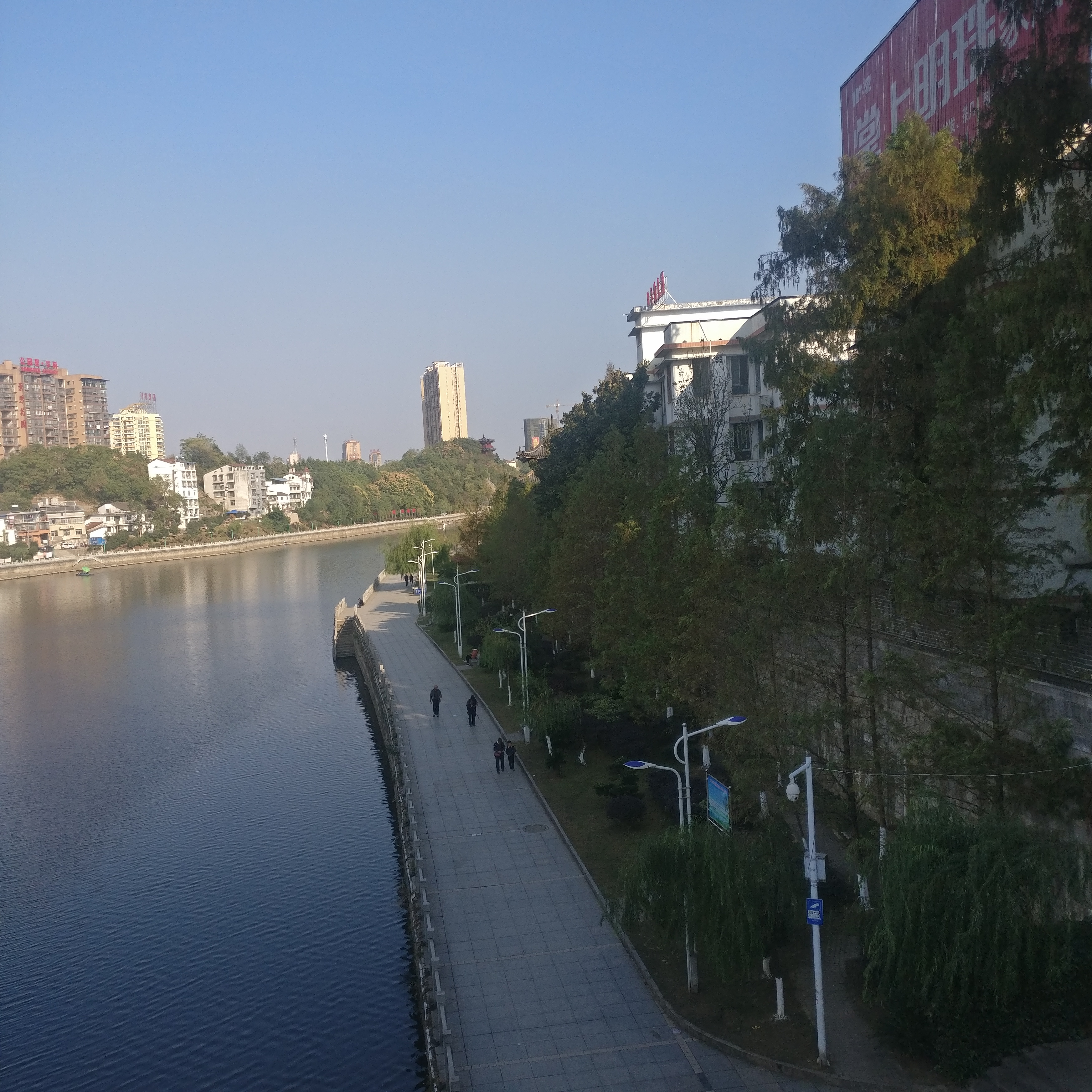 赤壁市陸水河畔